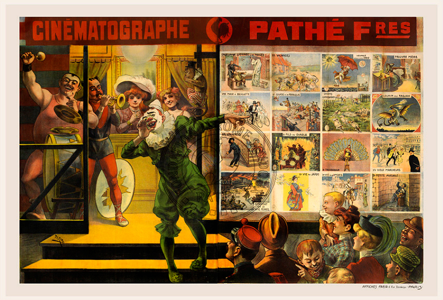 Cinématographes Pathé Frères, 1906